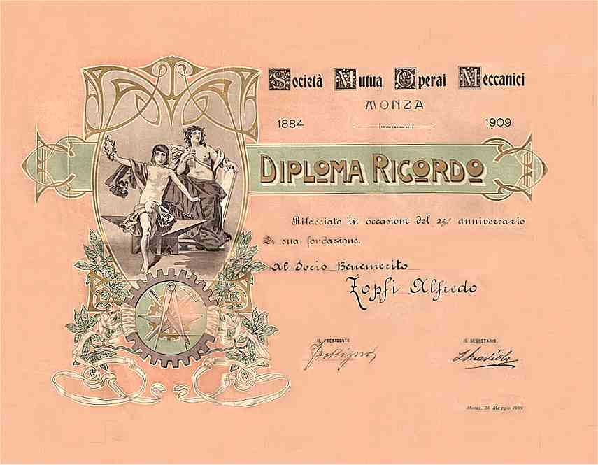 Alfredo Zopfi - diploma ricordo del 25° anniversario della Società Mutua Operai Meccanici di Monza 1884 - 1909